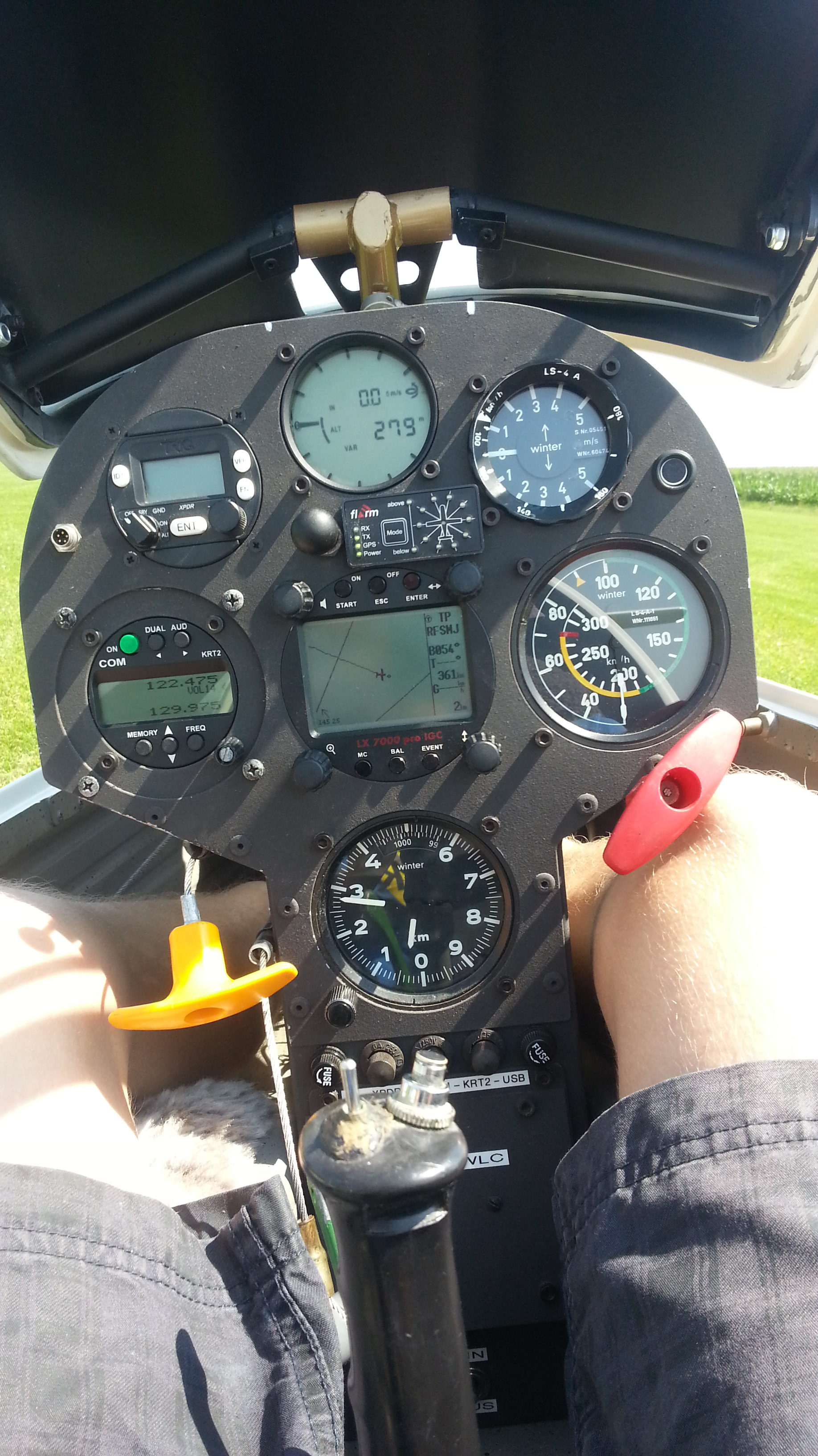 Instrumentenpanel einer LS-4a der Luftsportfreunde Kamen/Dortmund 2000 D-0570 "WLC"